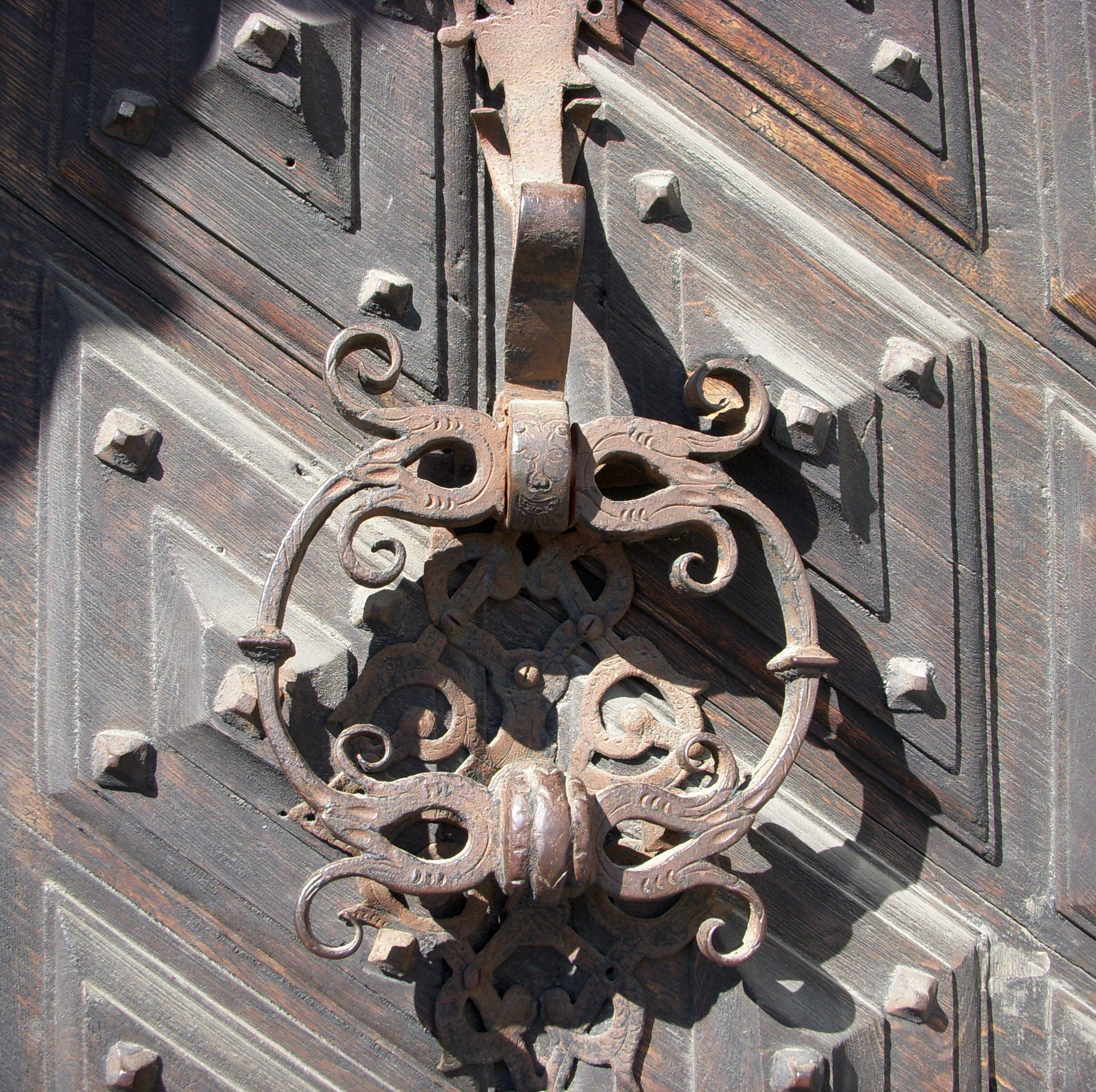 Skeppsbron 4, "Wittmarckska huset", Stockholm, dörrdetalj 1600-tal